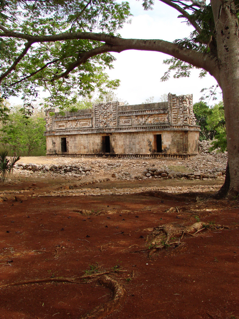 Xlapak, Yucatán, México